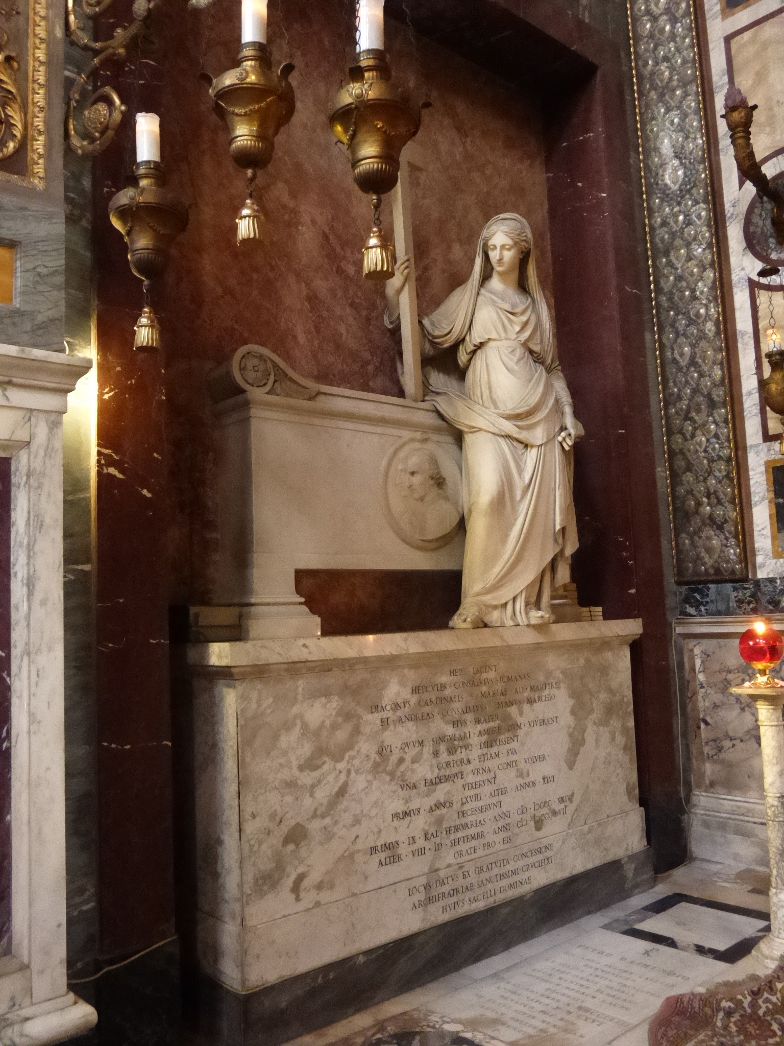 Roma, S. Marcello al Corso, cappella del Crosifisso. Monumento funebre del cardinale Ercole Consalvi e del fratello Andrea